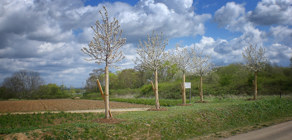 Beispiel für eine begleitende Baumreihe am Link